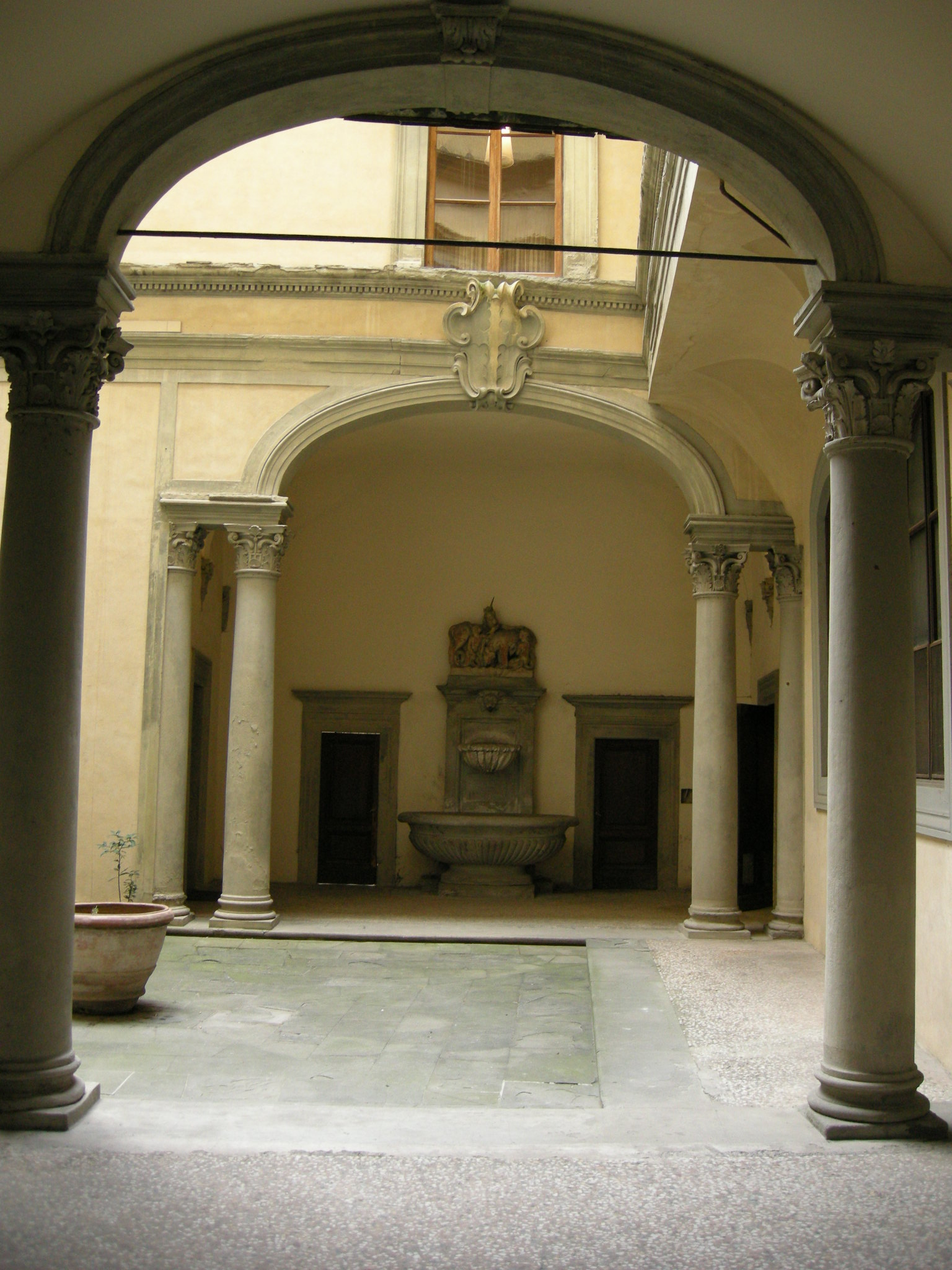 Palazzo guadagni, cortile